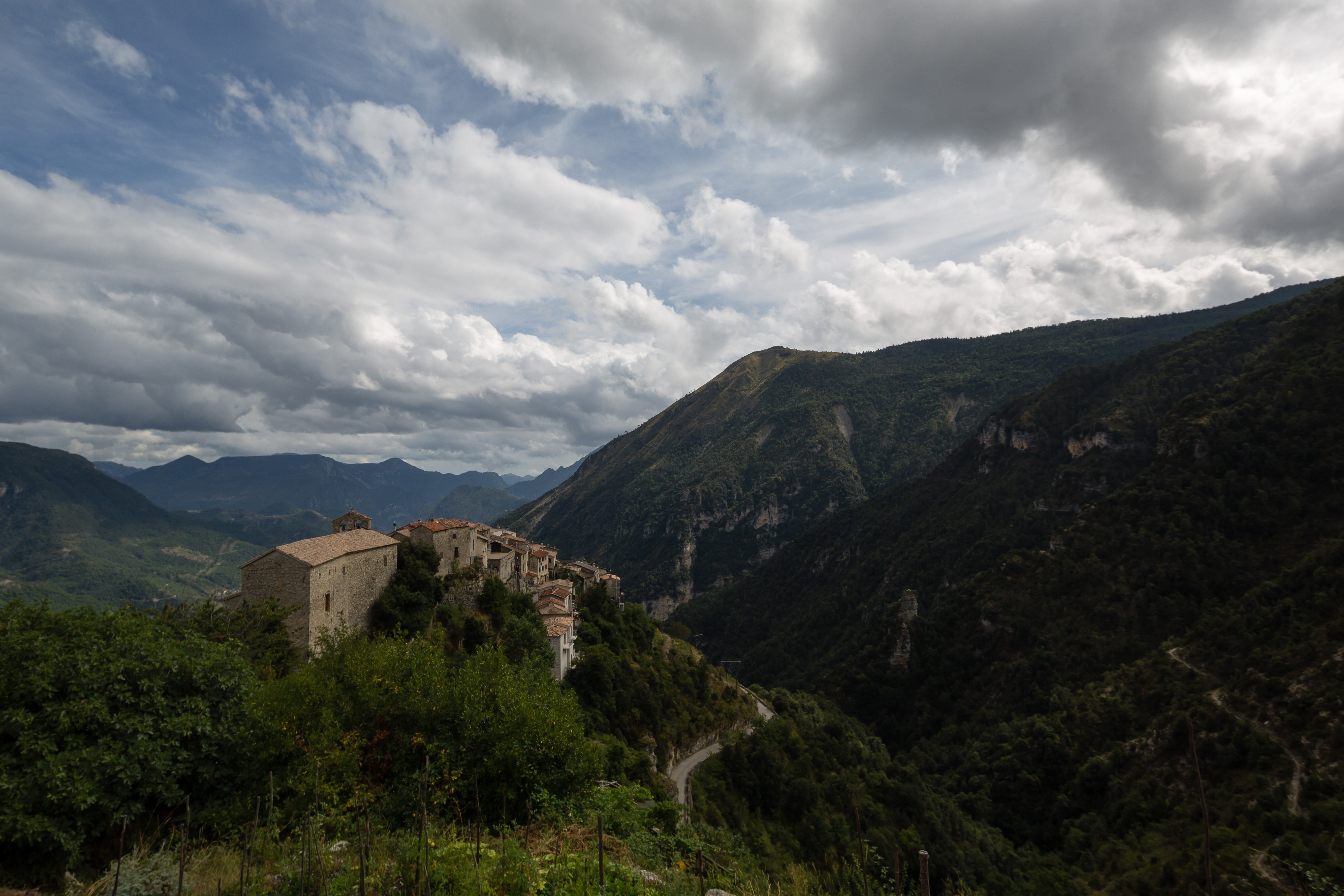 Bairols (France) depuis les hauteurs du village.